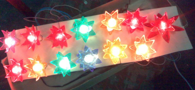 Румынская электрогирлянда "Luminare" с плафонами в виде кувшинок (13 ламп по 26 В, 100 мА)